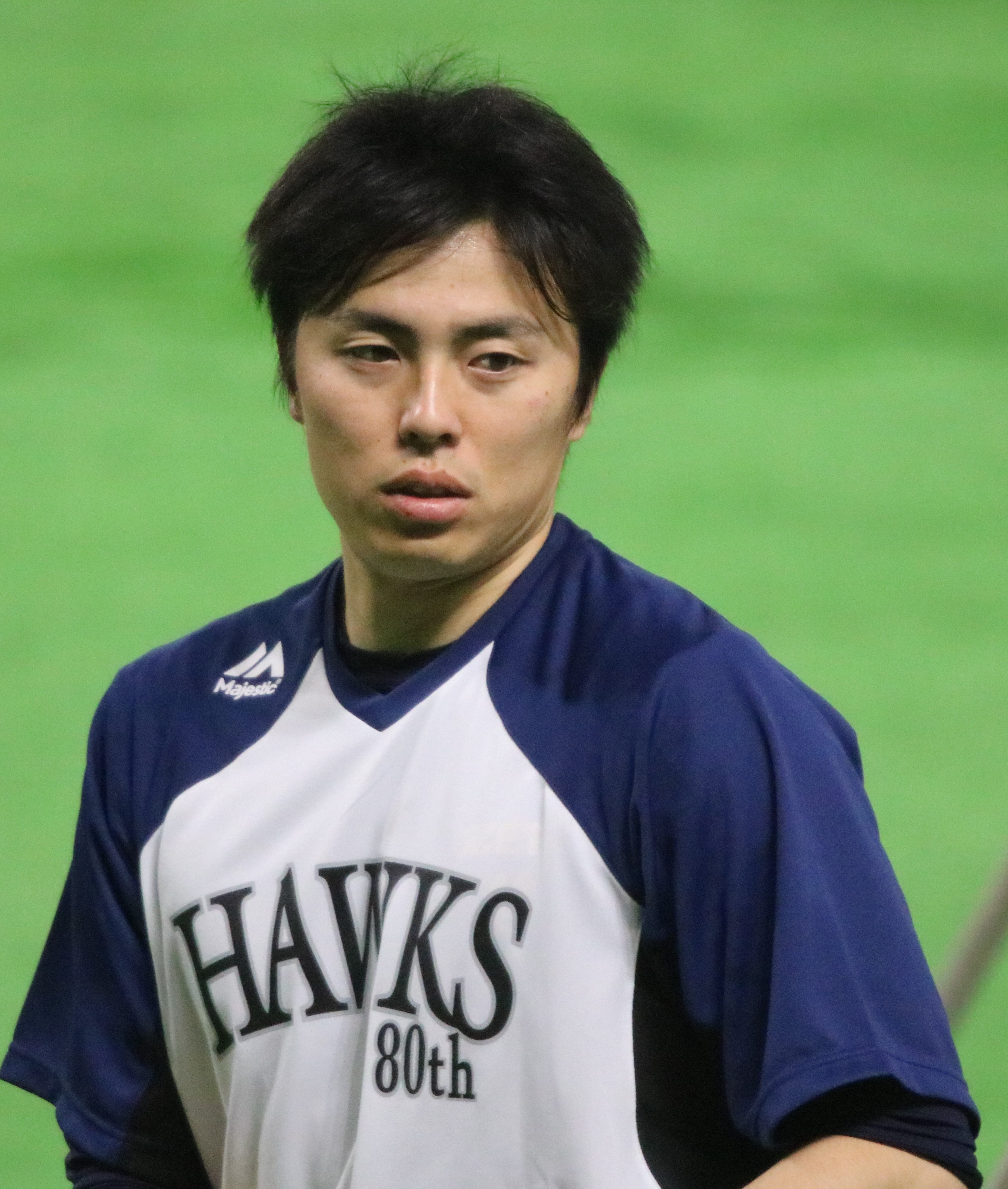 2018年3月31日試合前練習(福岡ヤフオクドーム)